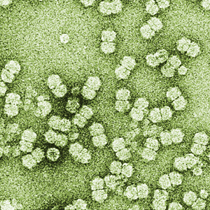 Begomovirus